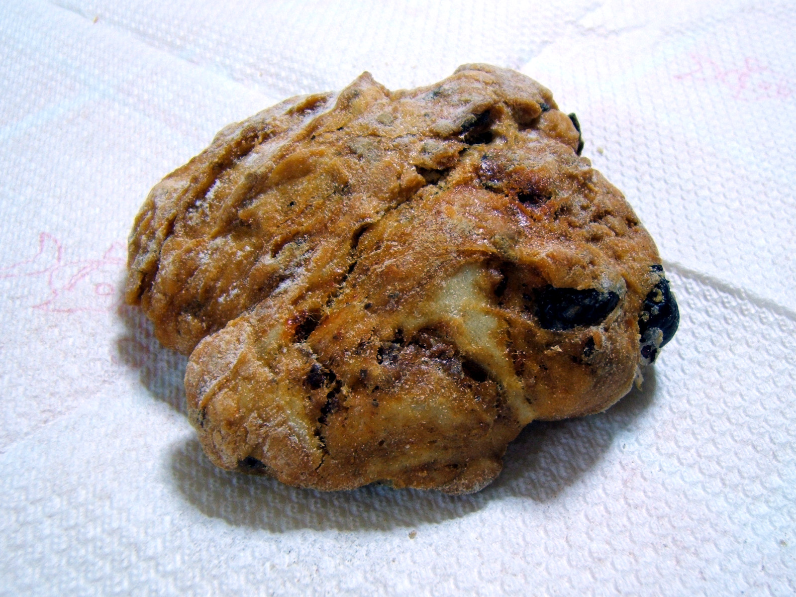 Puccia con le olive nere - versione piccola di diametro c.a. 10cm (prodotto tipico n°160 pucce, uliate, pane di semola, pane di orzo)